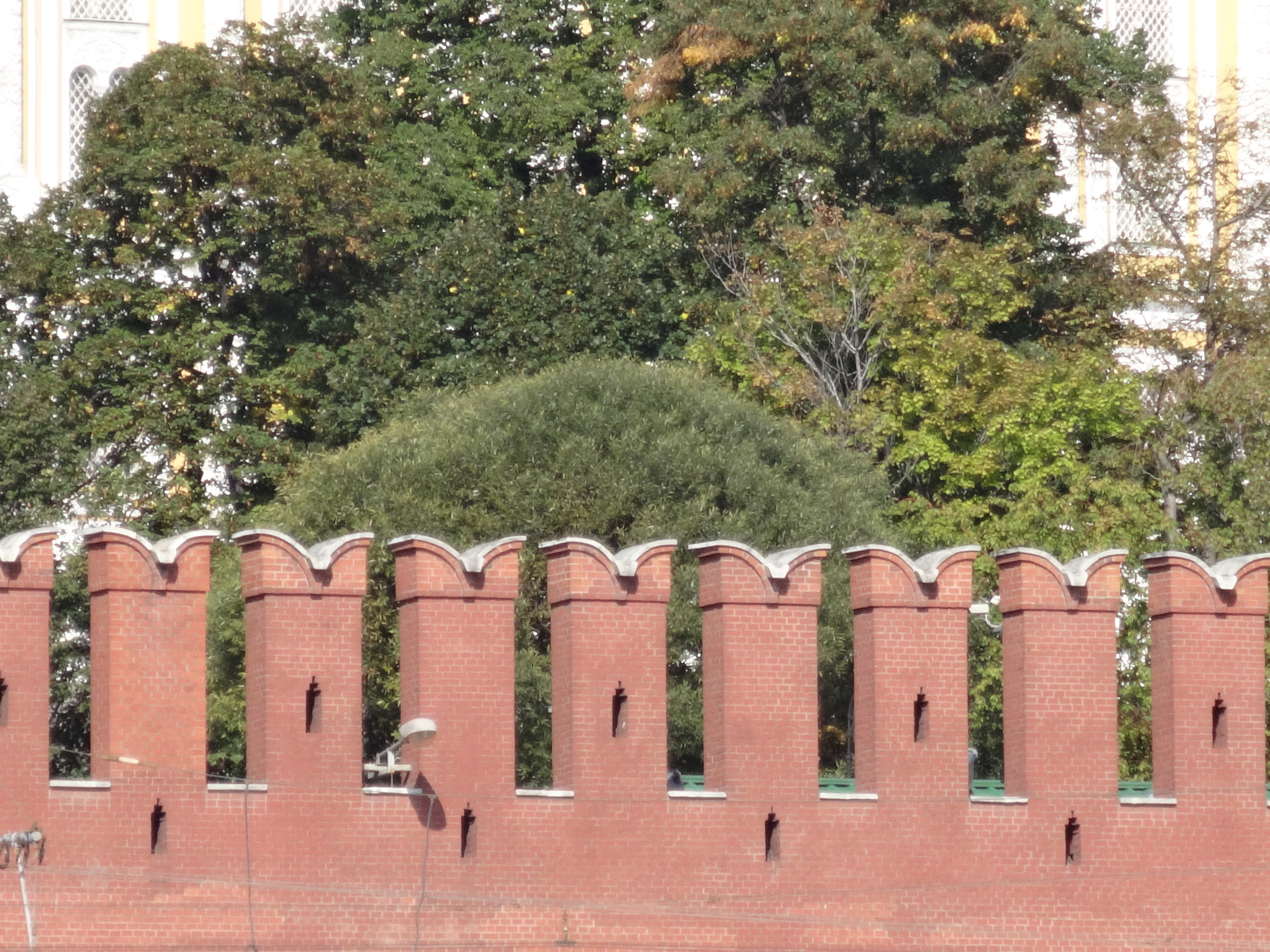 Московский Кремль (Москва и Московская область, Москва, Красная площадь, Кремлевская наб., Александровский сад)